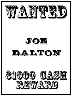 Joe Dalton wanted